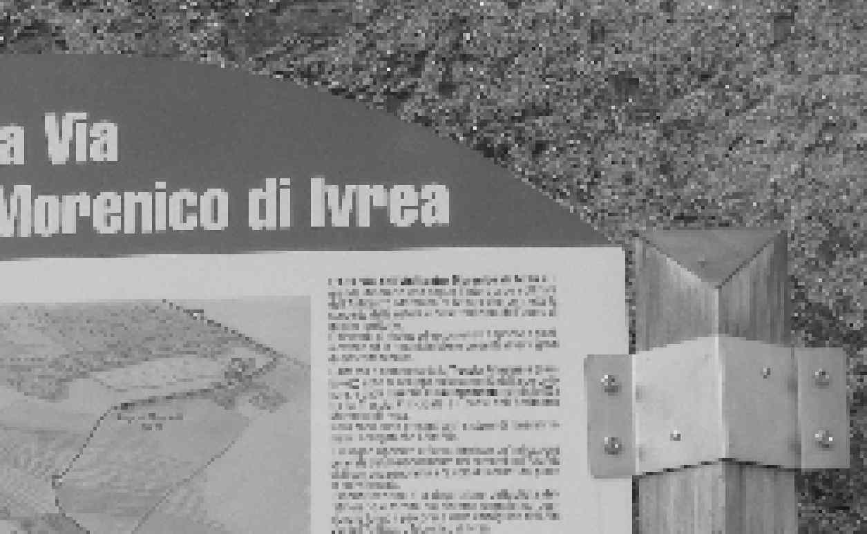 Maglione: pannello informativo per l'alta via dell'Anfiteatro Morenico di Ivrea